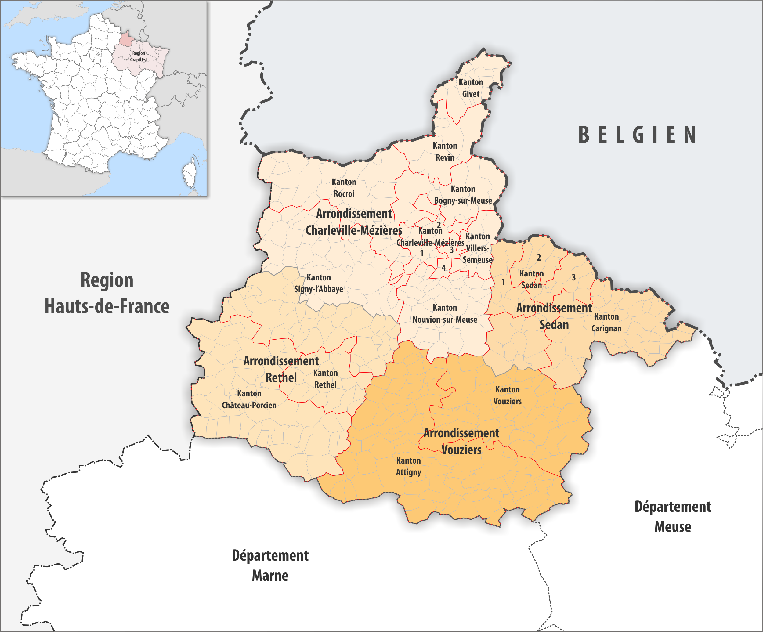 Gemeinden, Kantone und Arrondissemente im Departement Ardennes